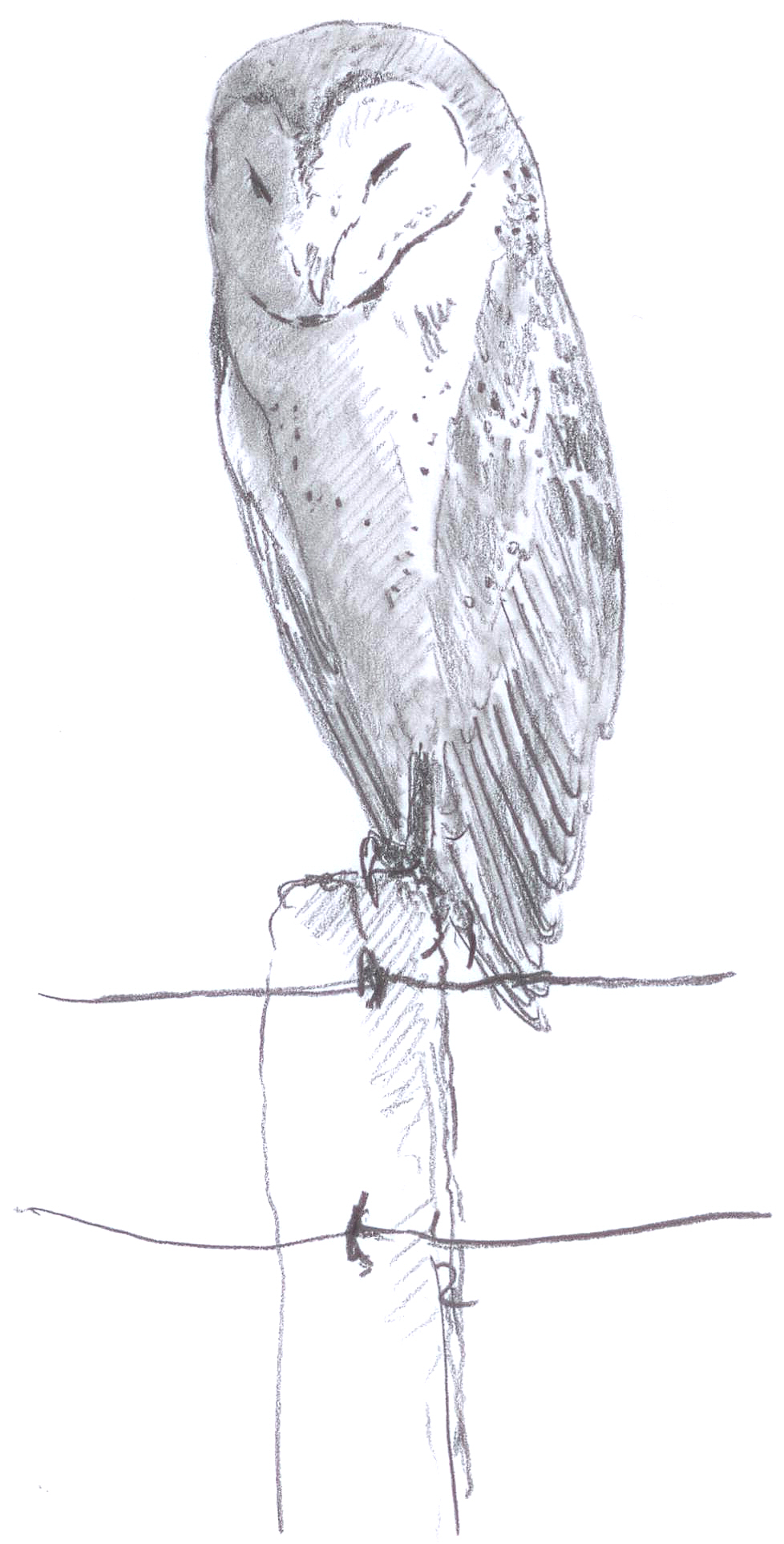 Tyto alba